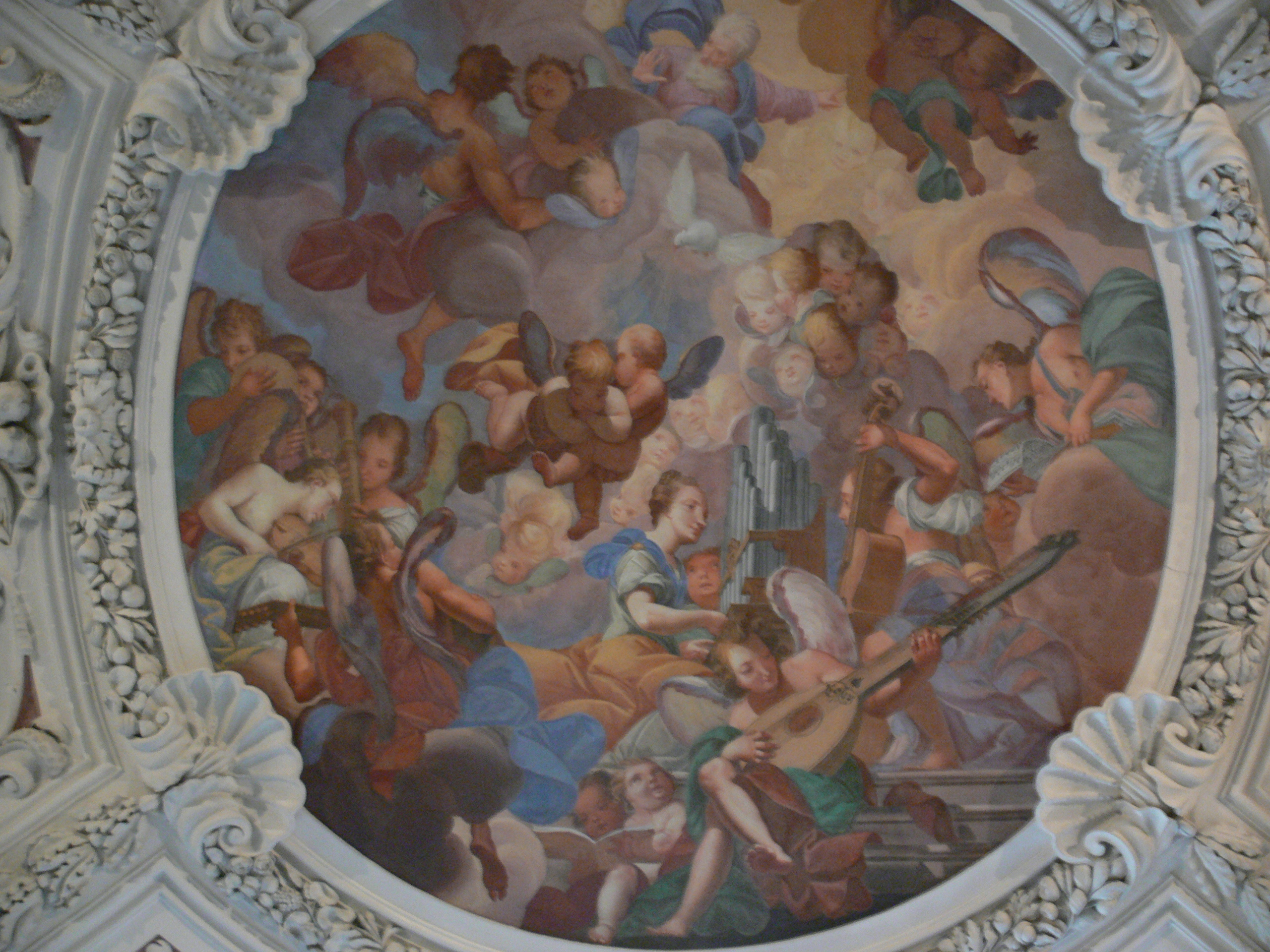 Passau, Dom St. Stephan; Gemälde unter der Orgelempore; Engelskonzert (Die hl. Cäcilia an der Orgel)